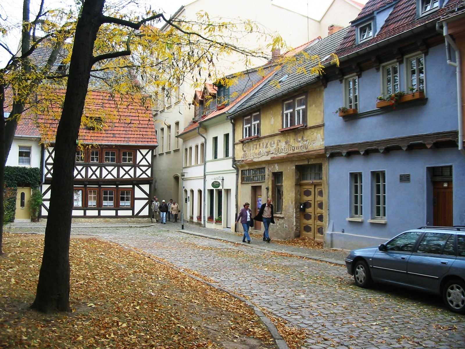 Aschersleben Duitsland